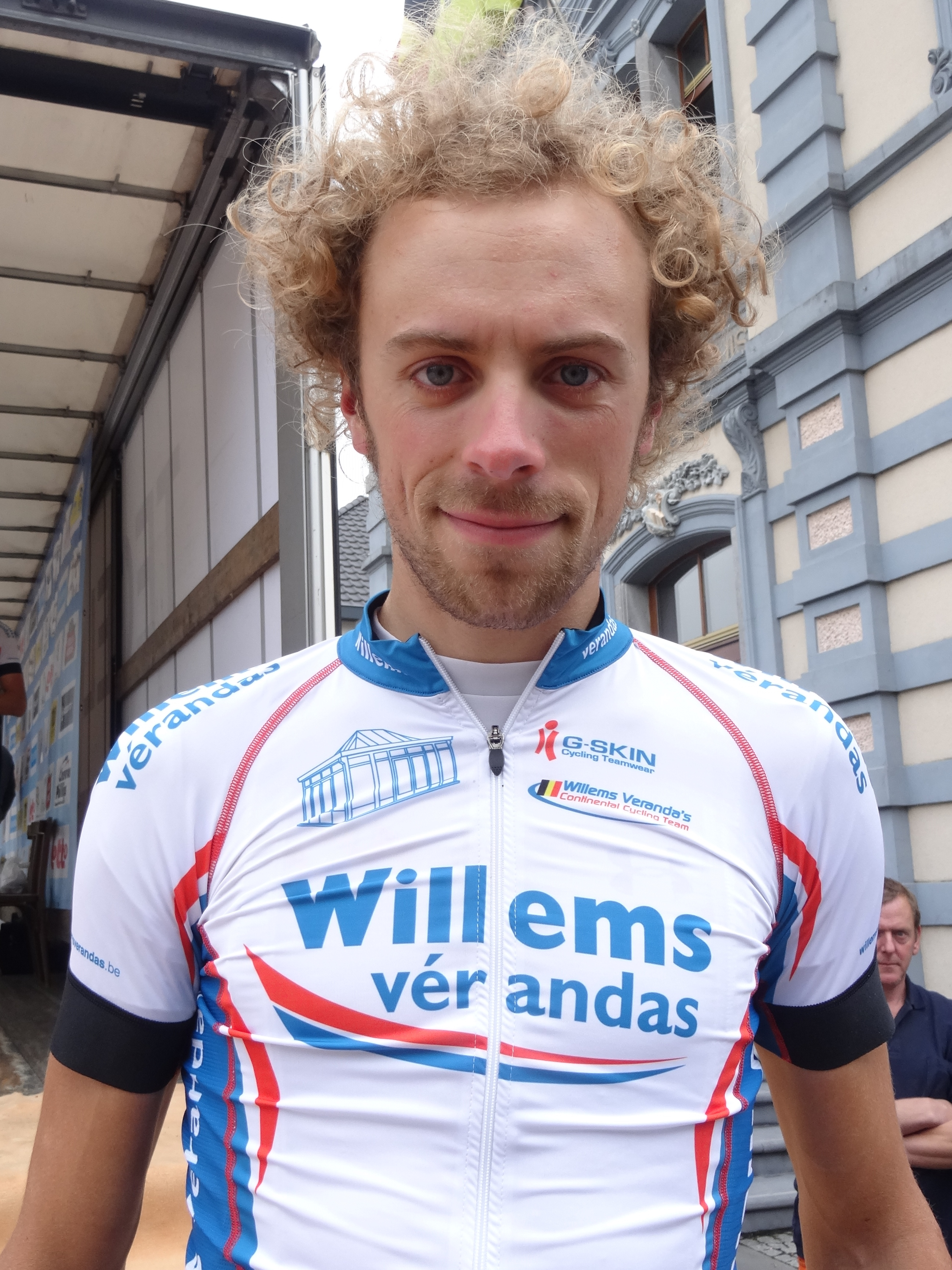 Reportage photographique réalisé le mercredi 27 août à l'occasion du départ de la Druivenkoers Overijse 2014 à Huldenberg, Belgique.